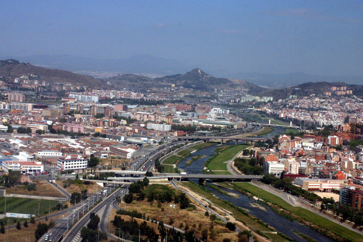 Vista del riu Besòs a uns centenars de metres de la desembocadura al seu pas per Sant Adrià de Besòs.